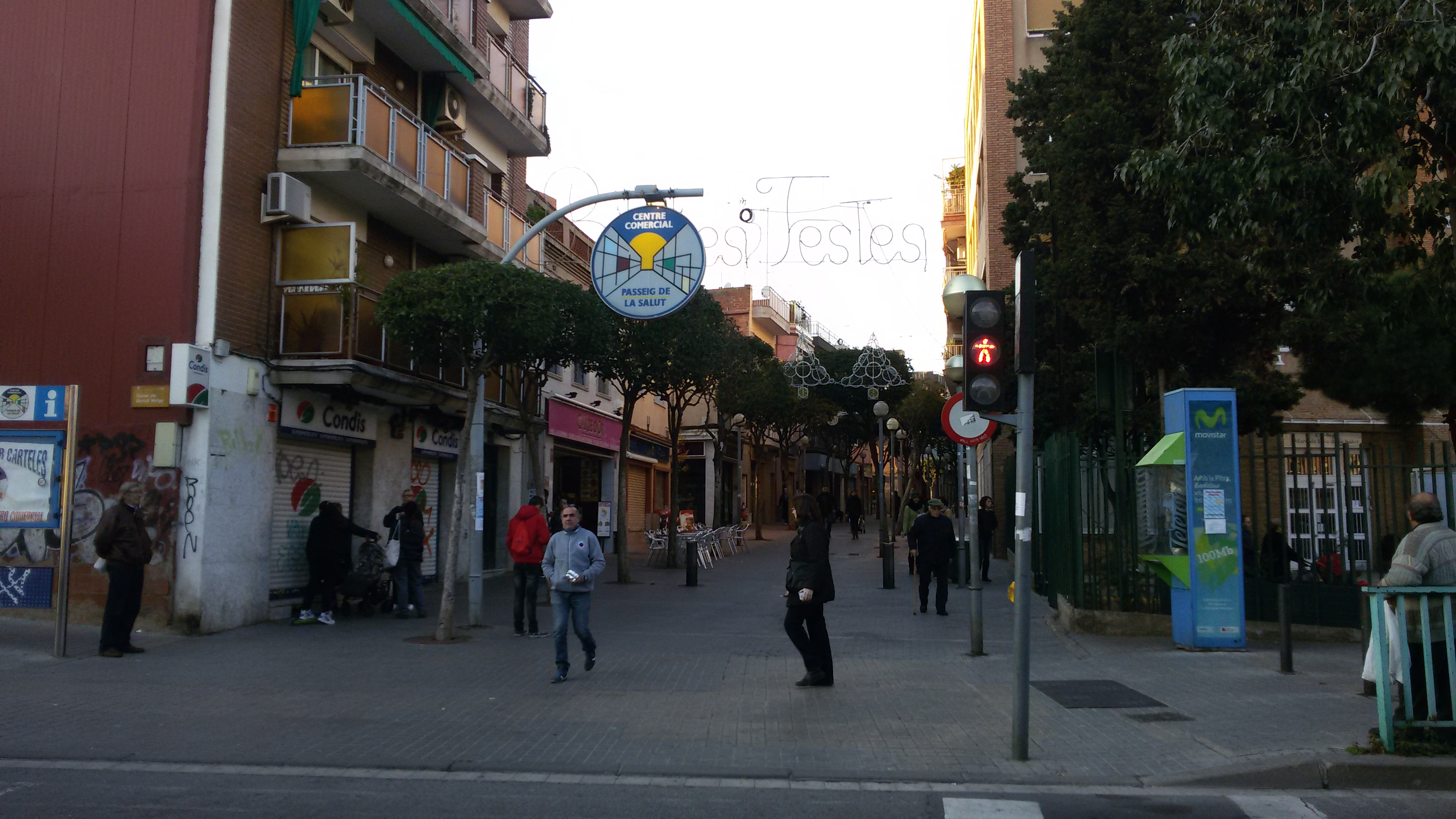 Passeig comercial de La Salut, Badalona.